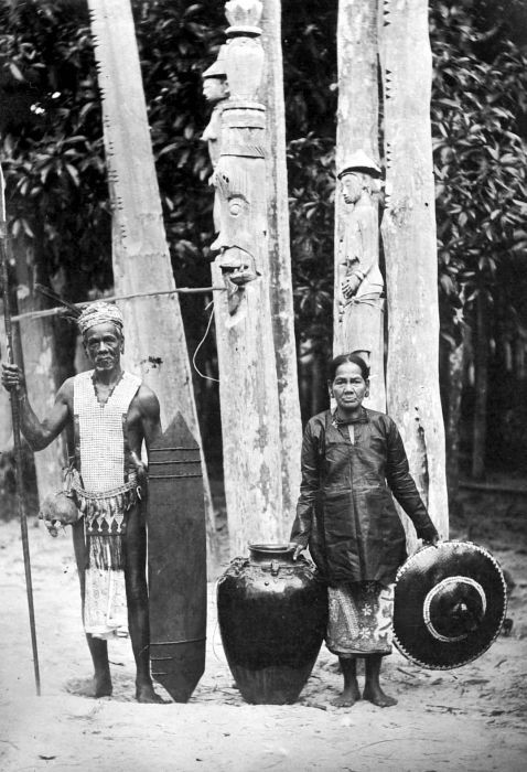 Repronegatief. Een koppensneller met aan zijn gordel een schedel, die bij feesten gebruikt wordt om uit te drinken, een vrouw met een grote 'blangai' pot en achter hen palen voor het dodenfeest 'Tiwah', Borneo